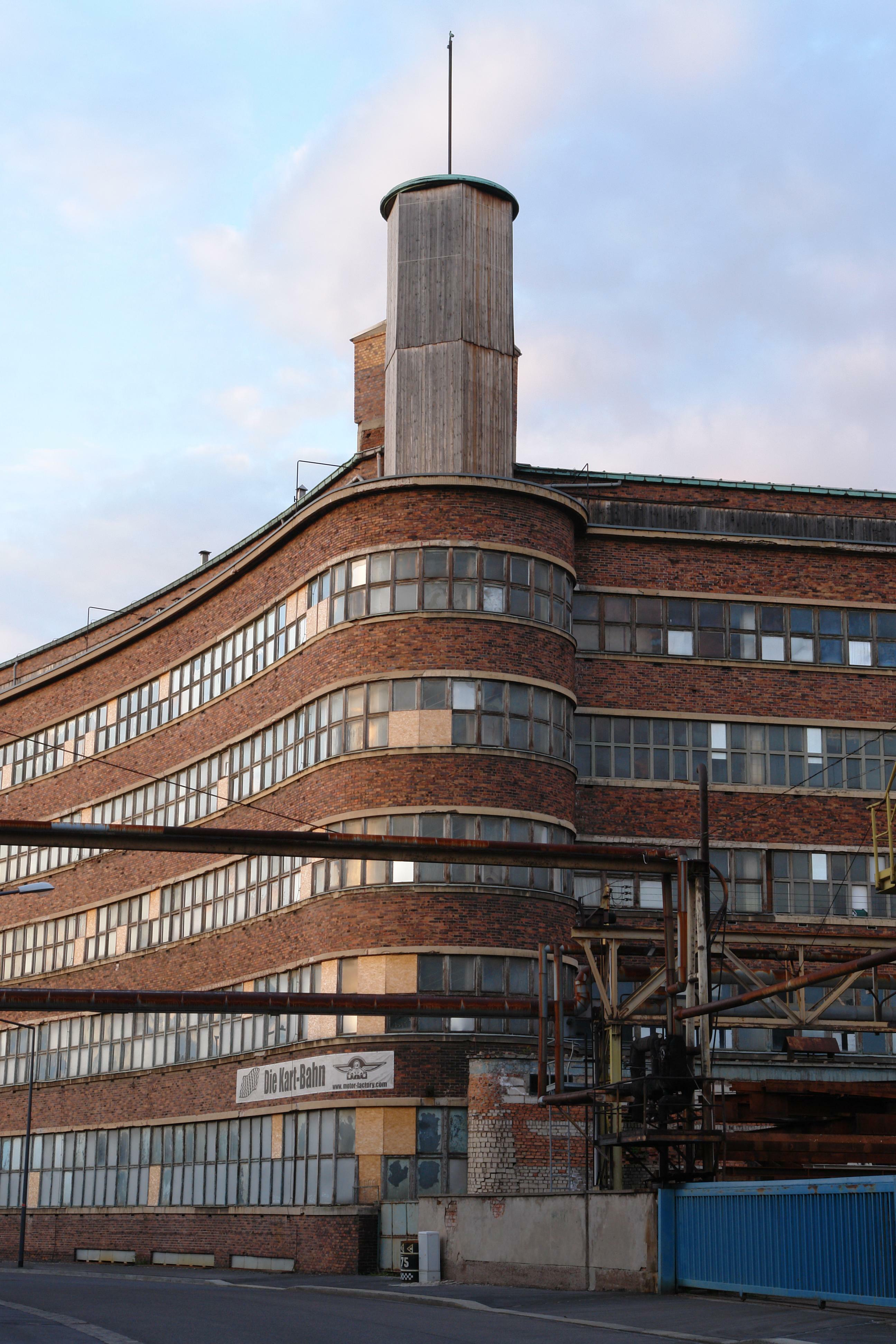 Fabrikstraße 13 Dresden